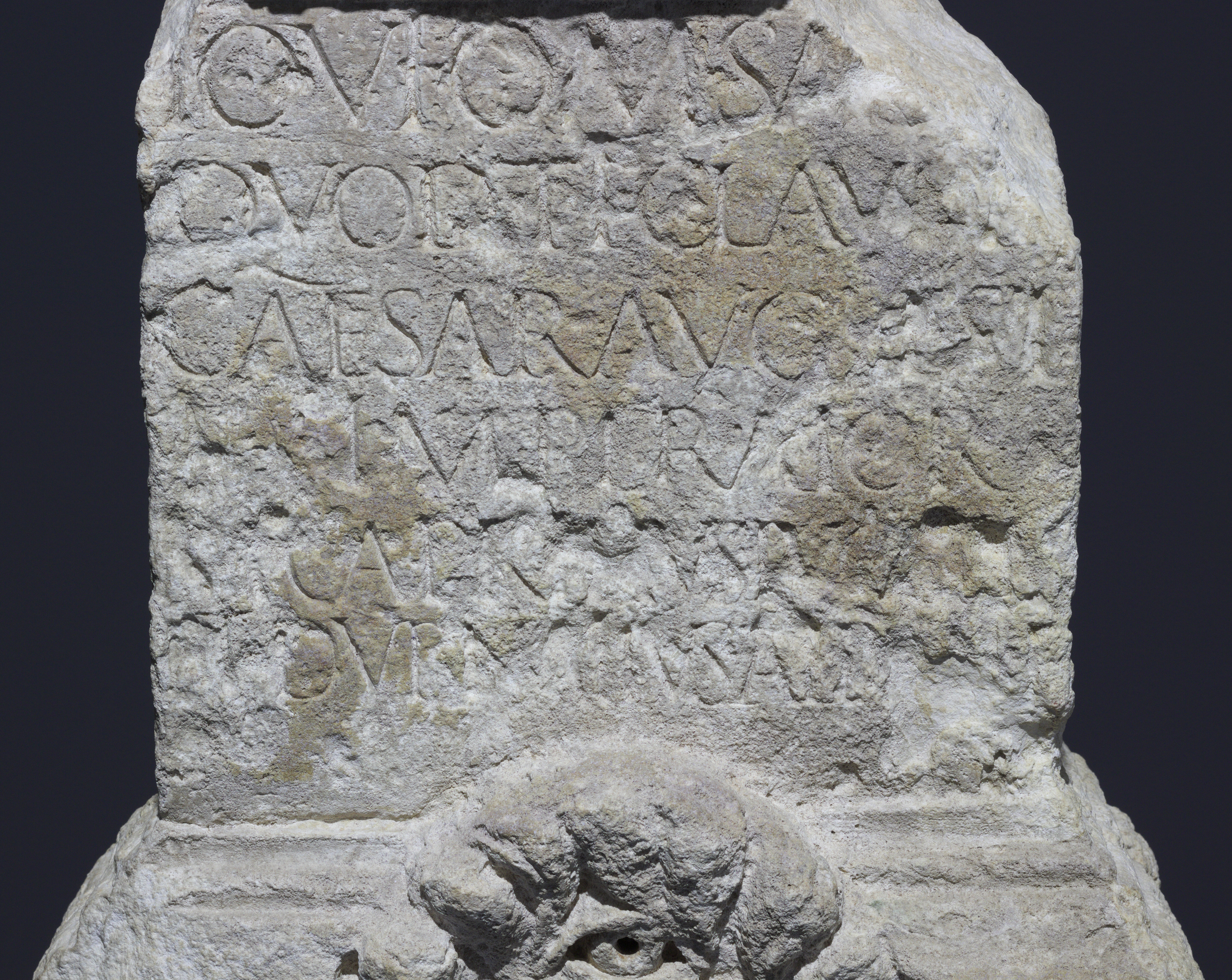 Découverte à Lyon en 1967, calcaire.